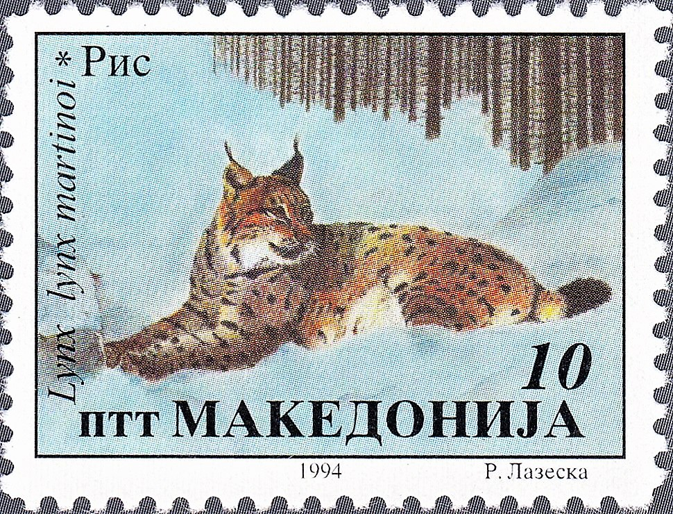 Lynx lynx martinoi